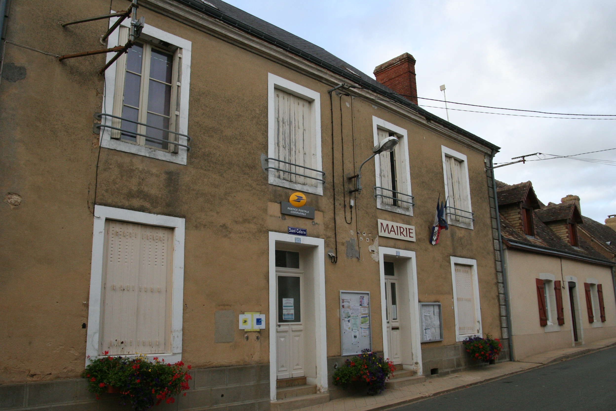 Mairie et poste de Saint-Célerin.